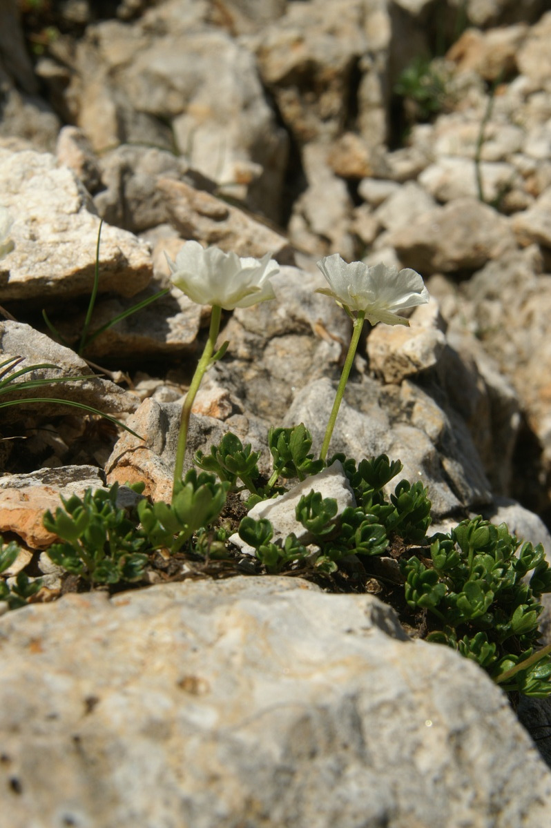 Alpska zlatica na melišču pod Veliko Martuljško Ponco.